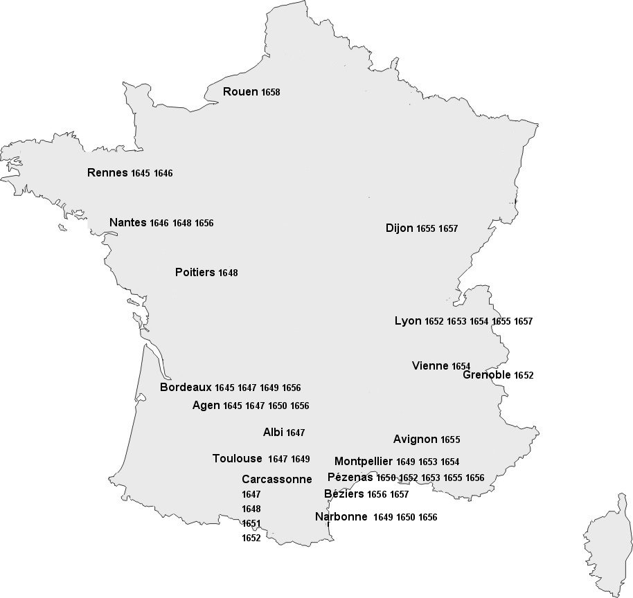 Les tournées en province de la troupe de Molière (Source :Roger Duchêne, Molière,Fayard,1998)